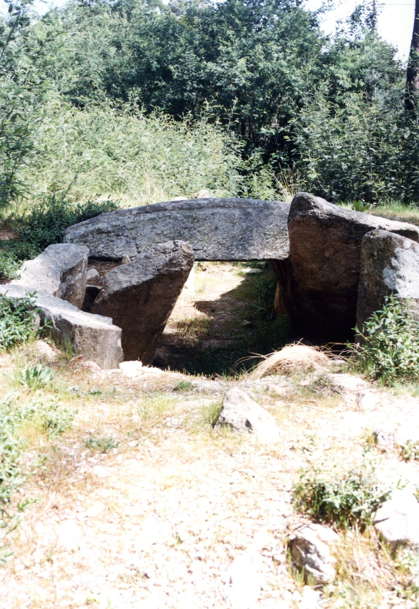 Anta do Pinheiro dos Abraços This file was uploaded for Wiki Loves Monuments in Portugal with the unique identifier 73334.